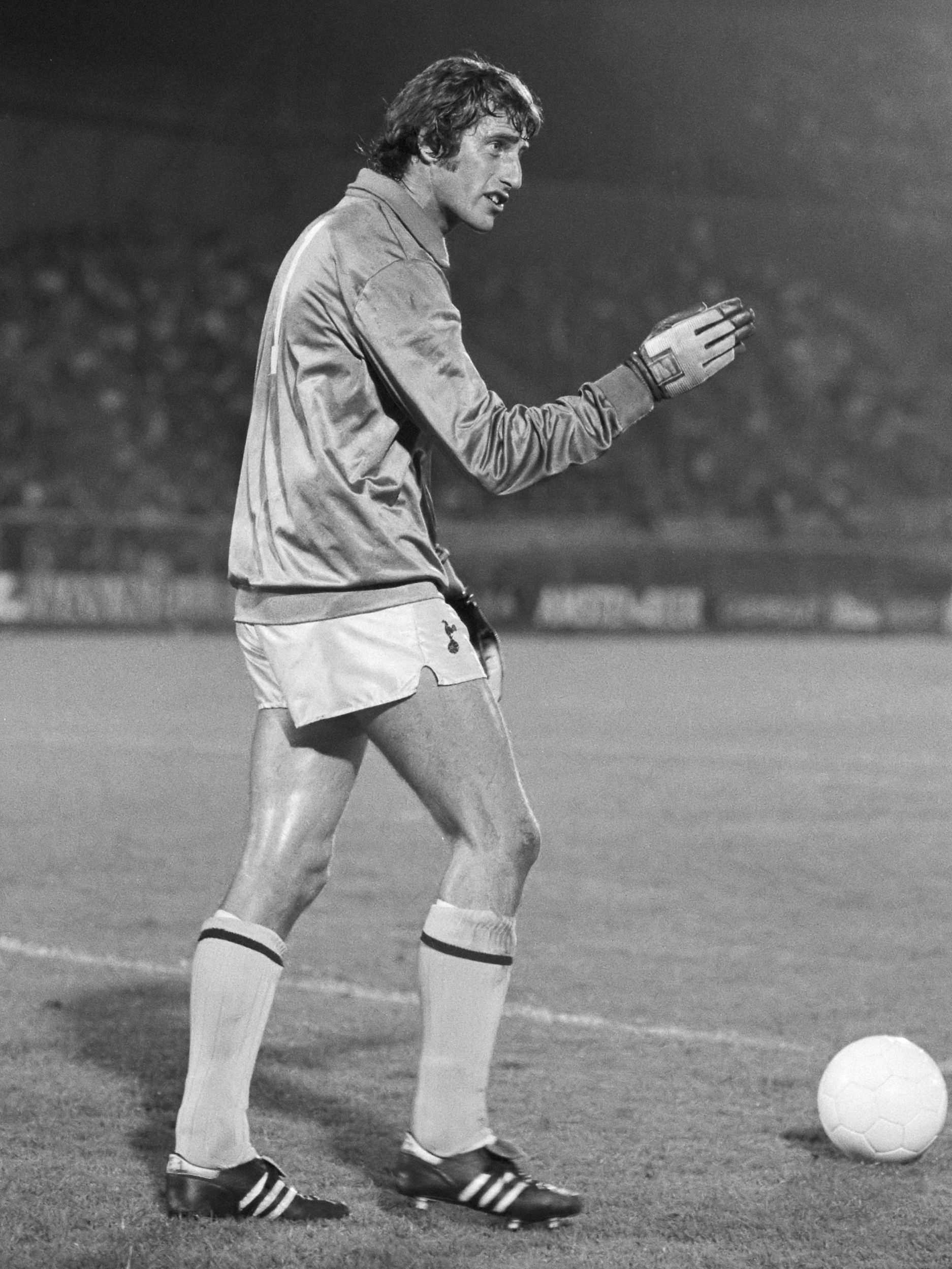 Voetbal Ajax tegen Tottenham Hotspur 1-3; de doelman van Tottenham Hotspur, Clemence, met de bal 16 september 1981